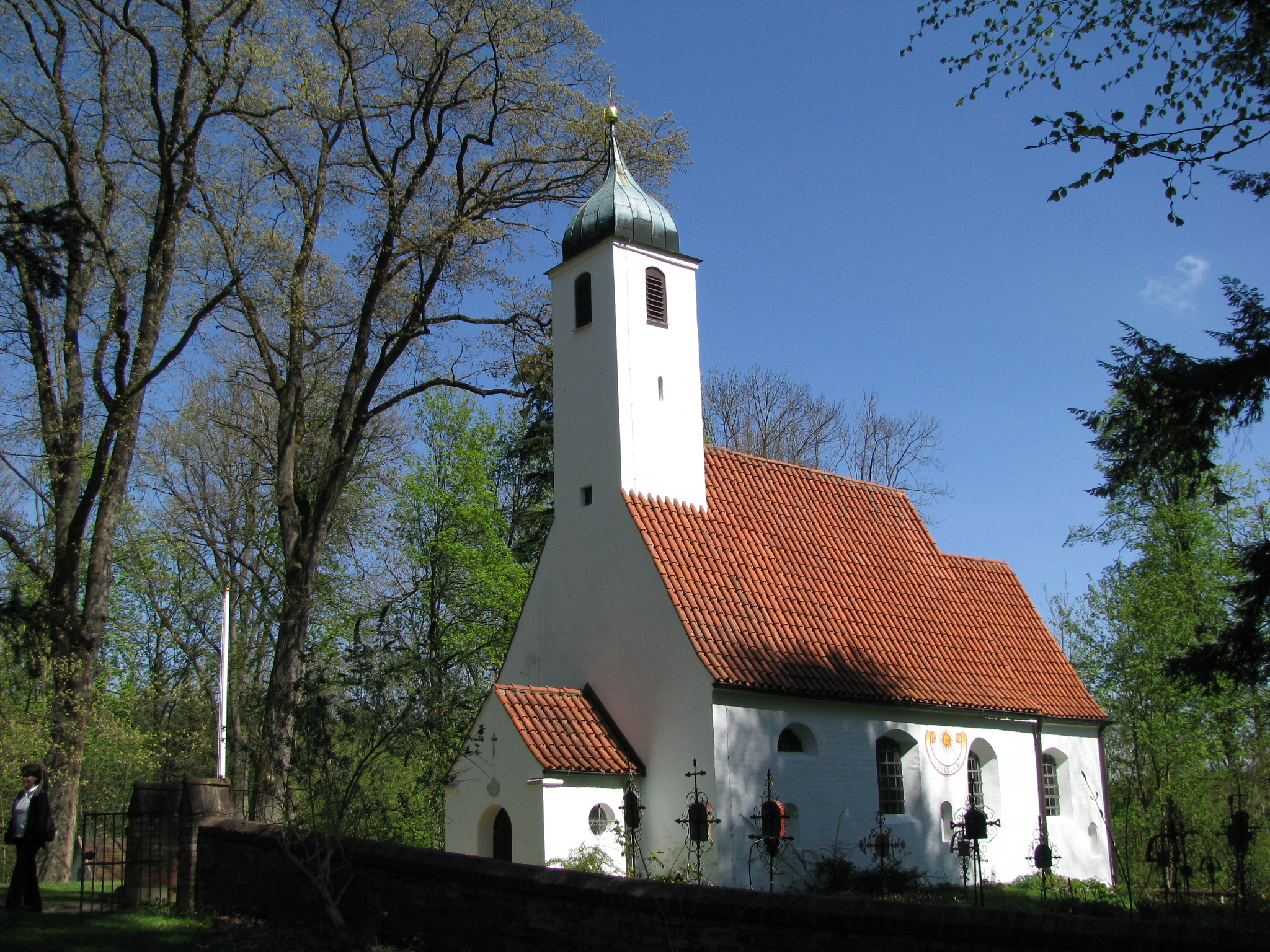 Die Filialkirche St. Clemens, auch als Waldkapelle Oberberghausen bezeichnet, ist eine kleine katholische Kirche in der Wüstung Oberberghausen in der Gemeinde Kranzberg (Landkreis Freising).